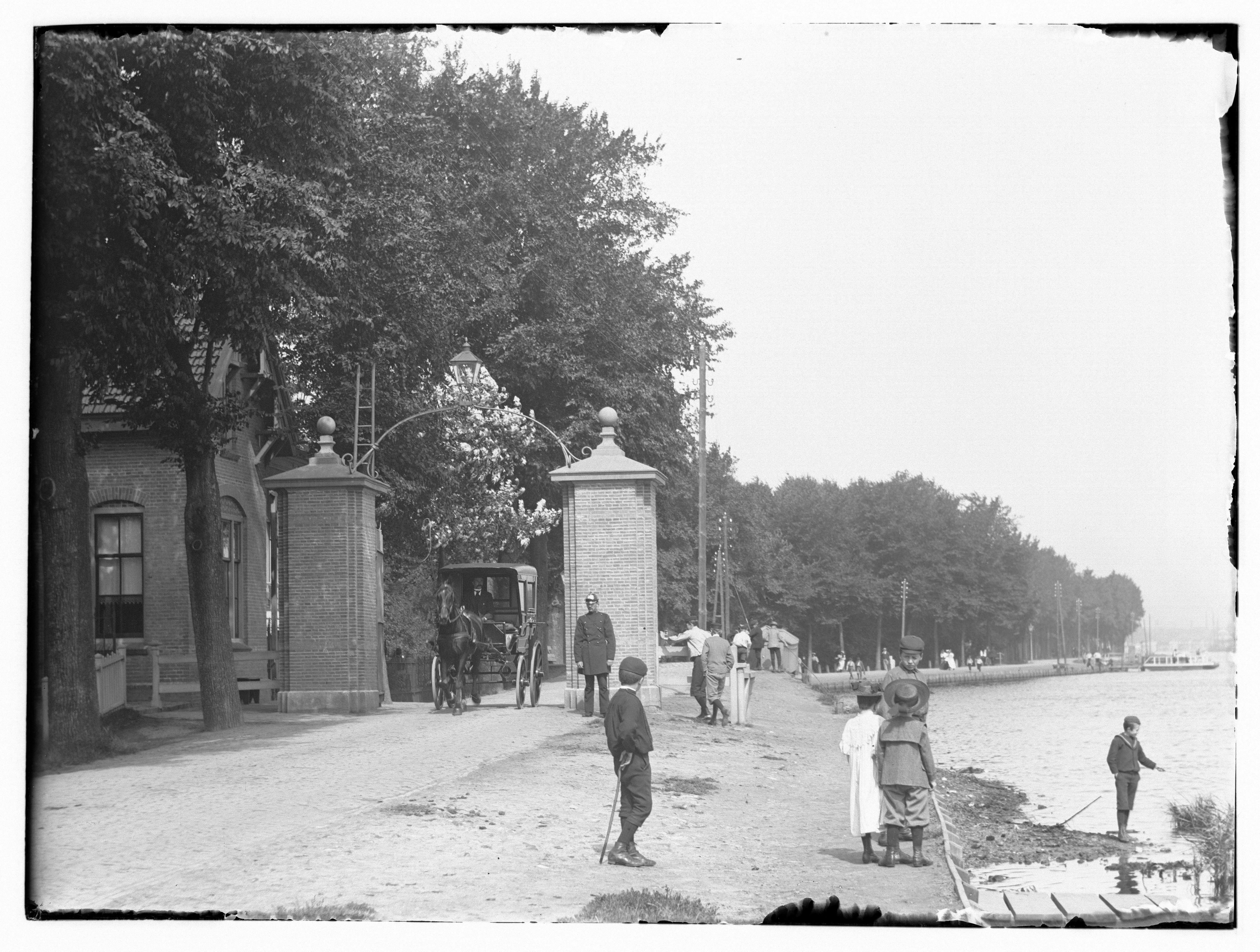 Beschrijving Amsteldijk t.h.v. 123 (voorheen 98) Het tolhek``, gezien in noordelijke richting Documenttype foto Vervaardiger Olie``, Jacob (1834-1905) Collectie Collectie Jacob Olie Jbz. Datering 10 augustus 1896 Geografische naam Amsteldijk Inventarissen Afbeeldingsbestand 010019000917 Generated with Dememorixer